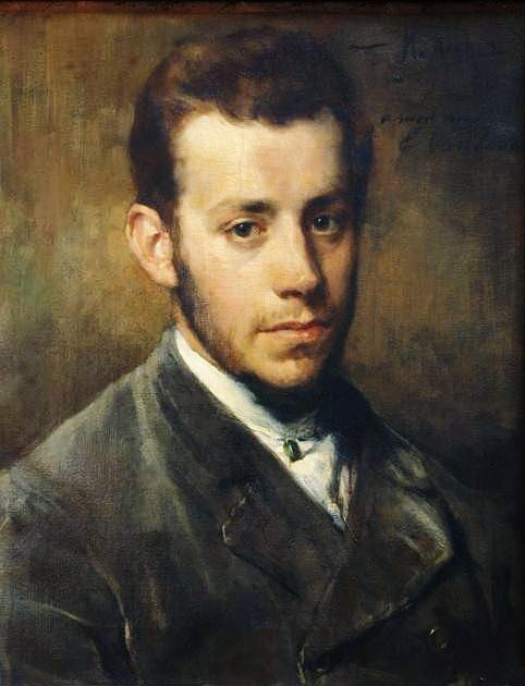 Portrait de l'artiste Emile Van Doren